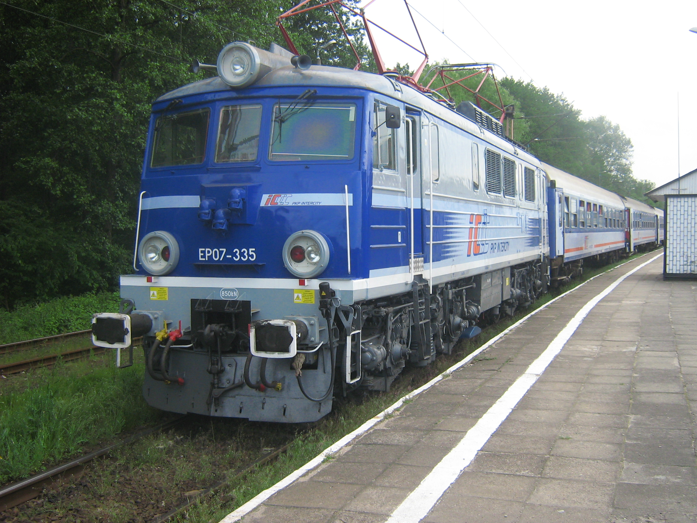 Lokomotywa EP07-335 wyruszająca z dworca Świnoujście.